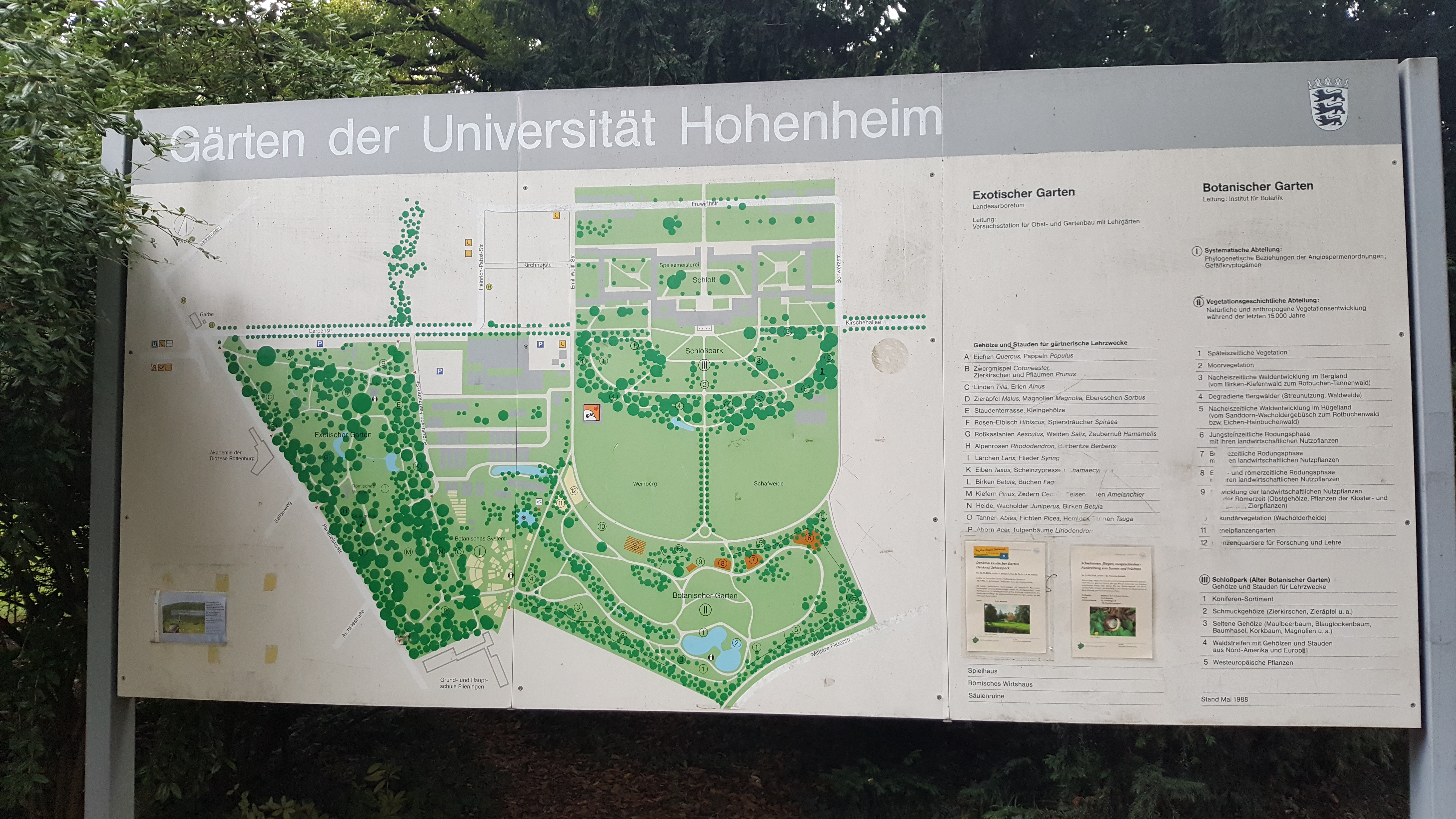 Gärten der Universität Hohenheim